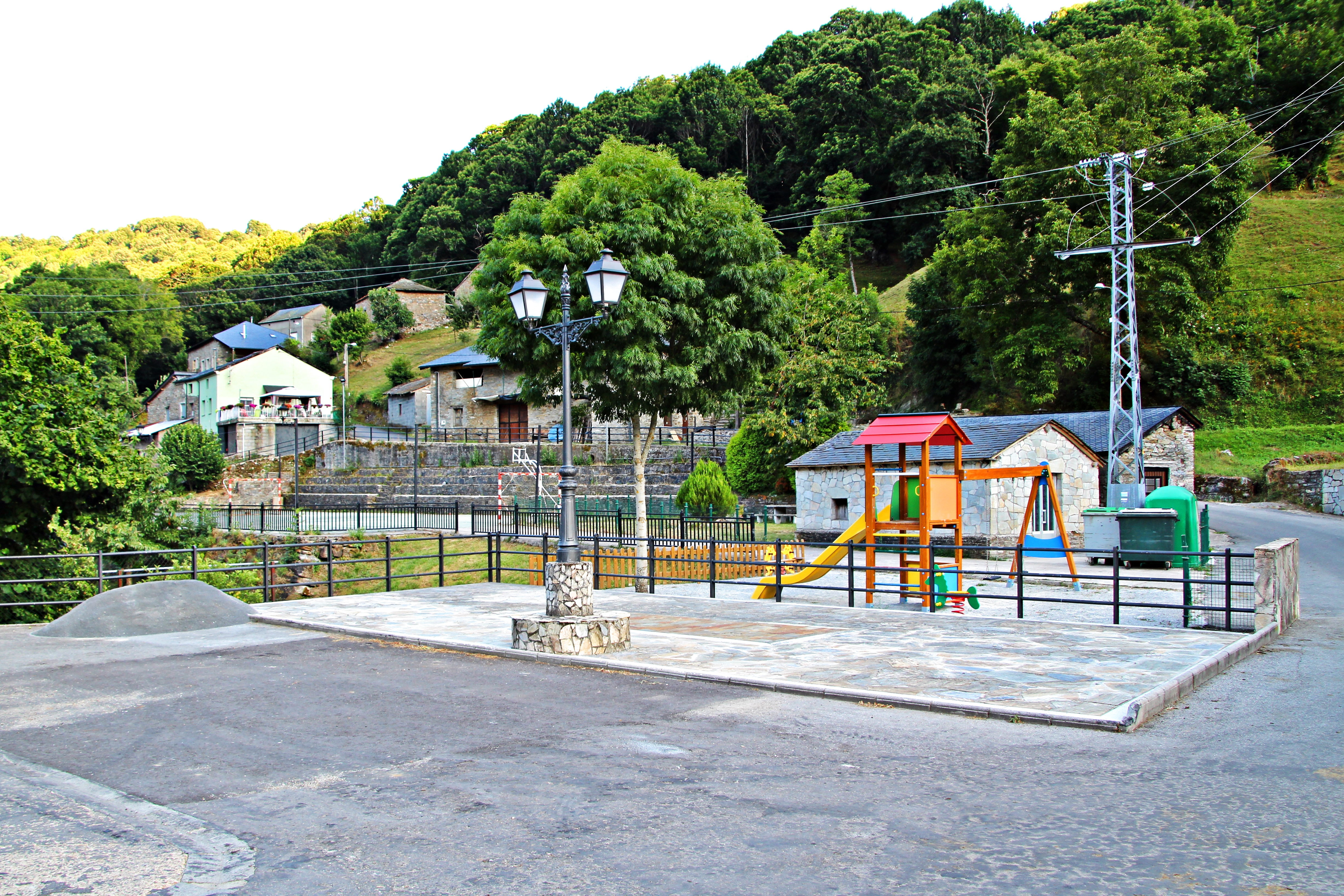 Barjas, comarca de El Bierzo, provincia de León